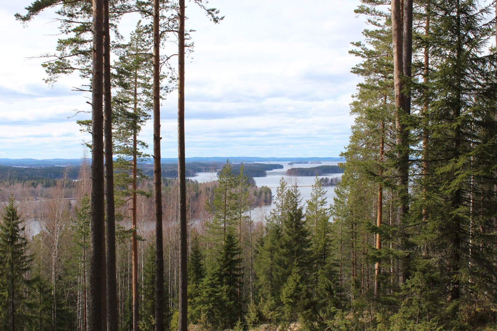 Vue sur les lacs entourant Kuopio depuis la colline de Puijo.